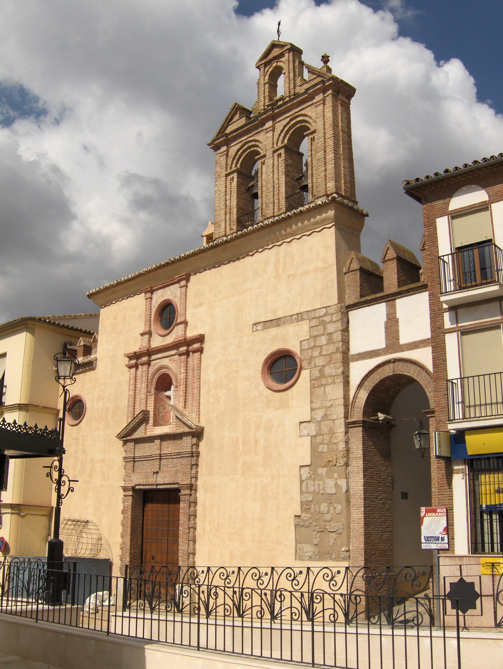 Iglesia de la Victoria, Archidona, Málaga, España.